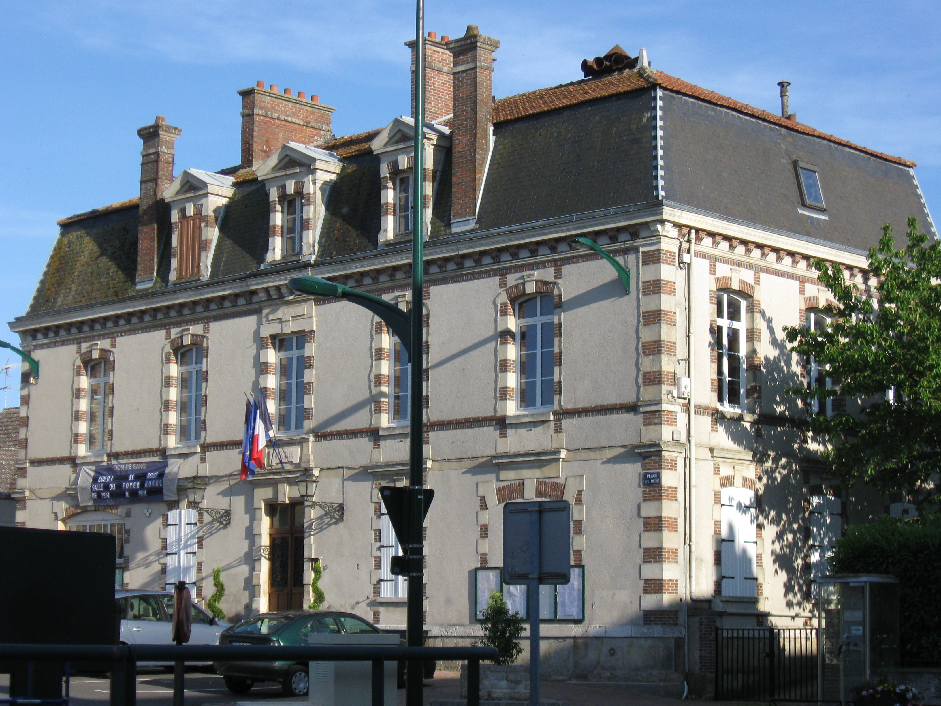 Mairie de Villiers-Saint-Georges. (Seine-et-Marne, région Île-de-France).